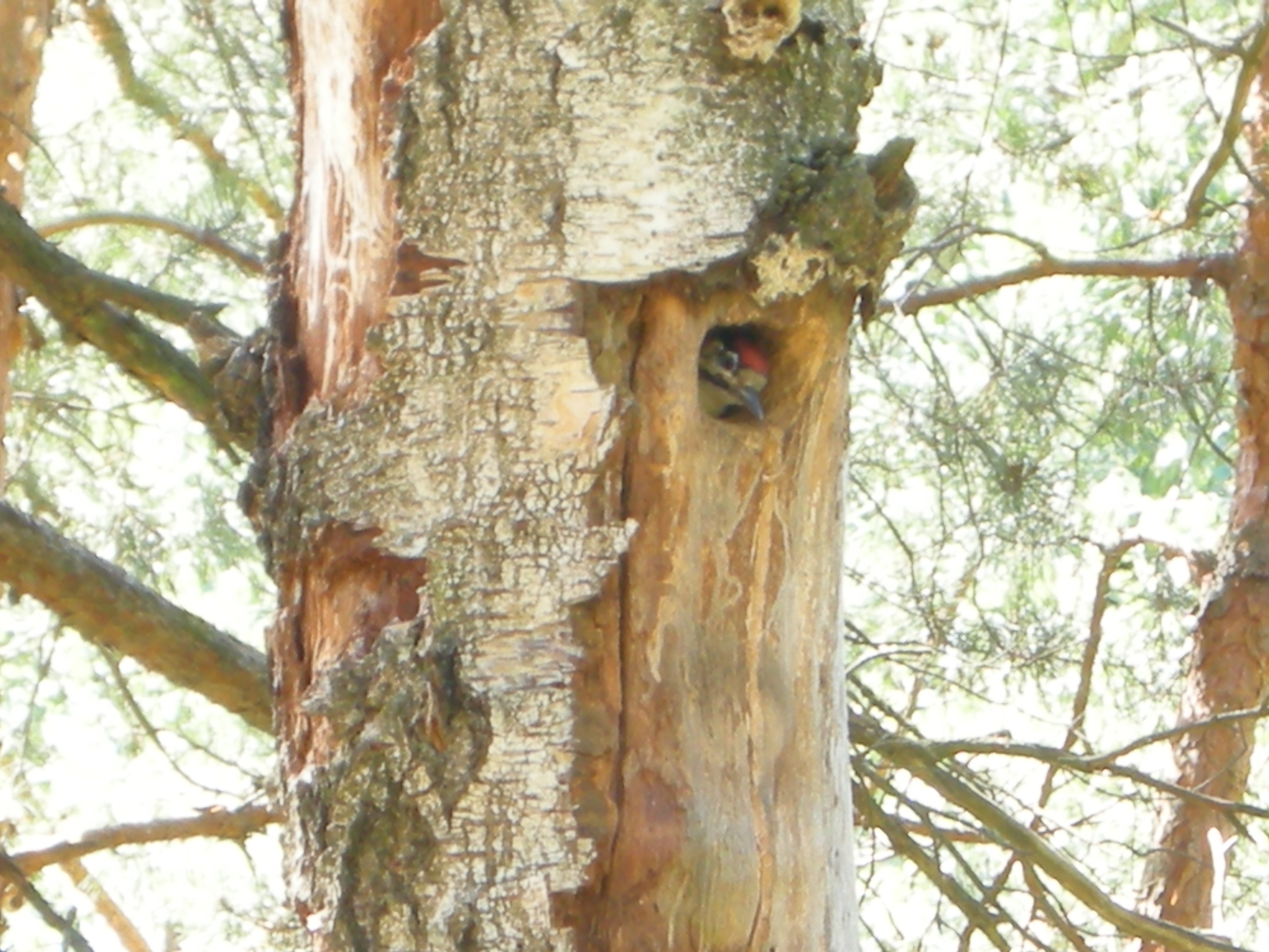 Пташка визирає з дупла.